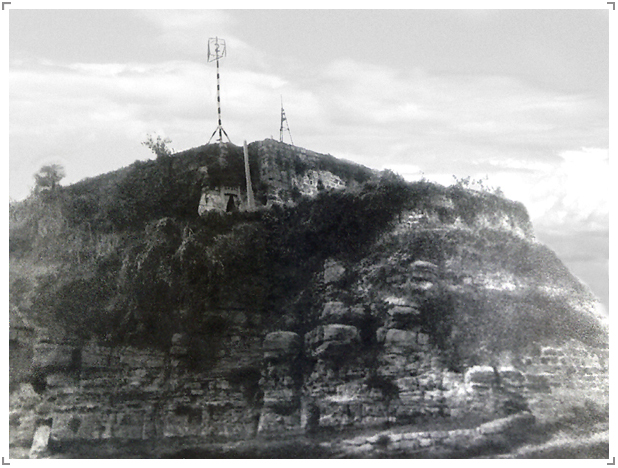 日军轰炸后石鼓山破坏严重